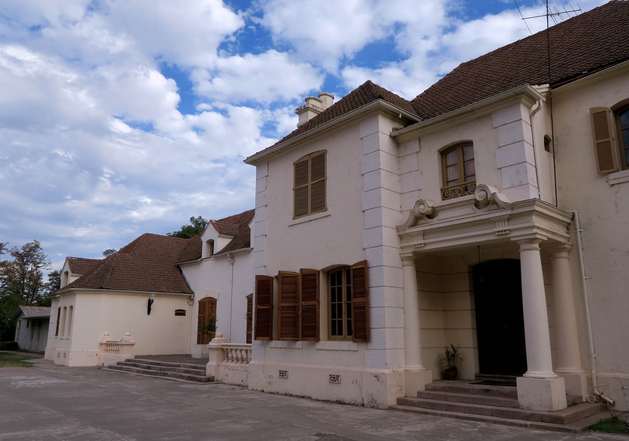 Centro Mariápolis en Cunaco